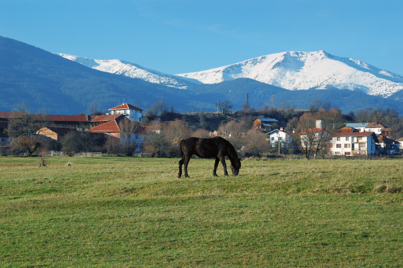 село Годлево, 2007 Пламен Ташев